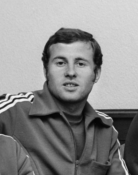 Bulgaars elftal in Kamen voor WK 74; Georgi Denev